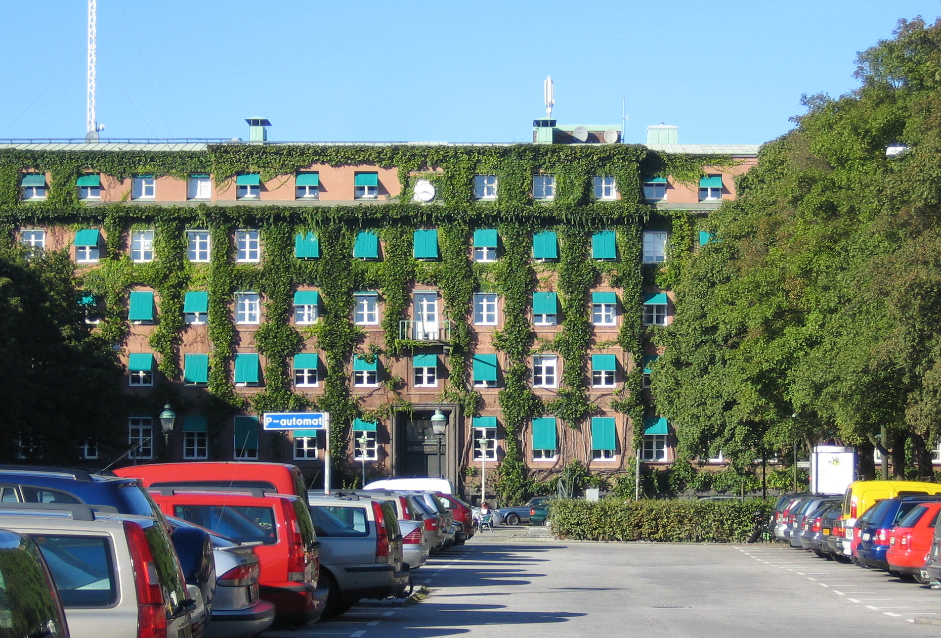 Davidshallstorg, Malmö, Sweden